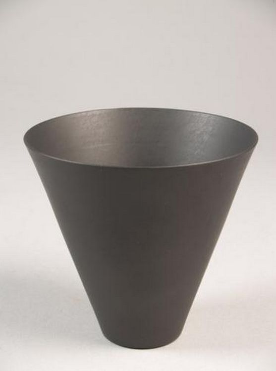 Titel: Containervorm uit serie van 99 Vervaardiger: Lap, Geert Soort object: containervorm Vervaardigingsdatum: 1993 - 1993 Vervaardiging plaats: Nederland